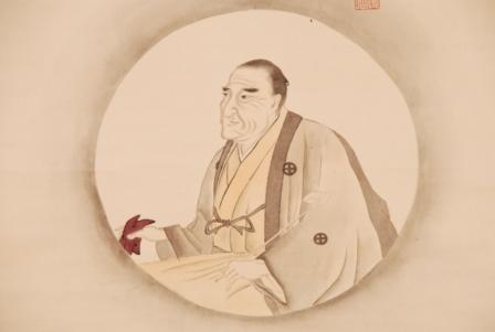 島津斉宣像